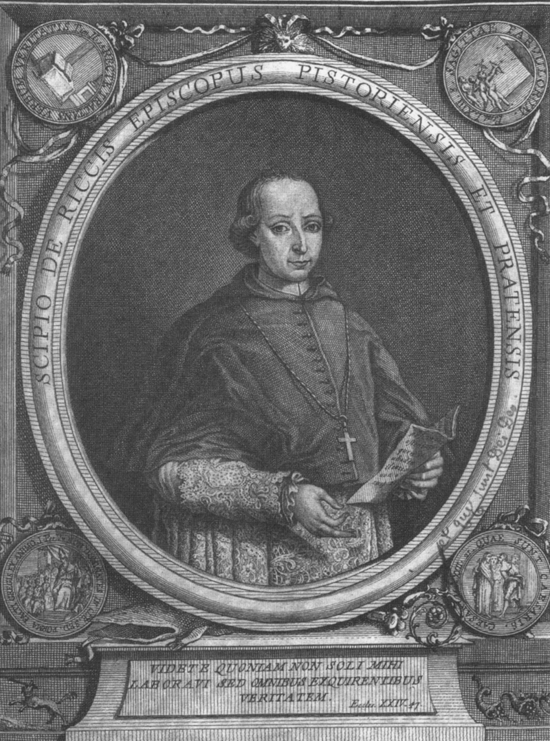 Portrait of Scipione de' Ricci (1741-1810)